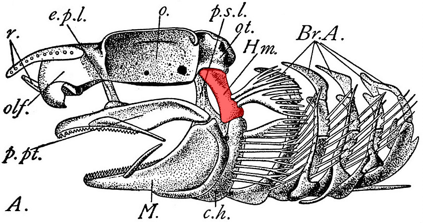 Hyomandibular-knoklen i skjelettet til en glatthai, modifisert fra this file